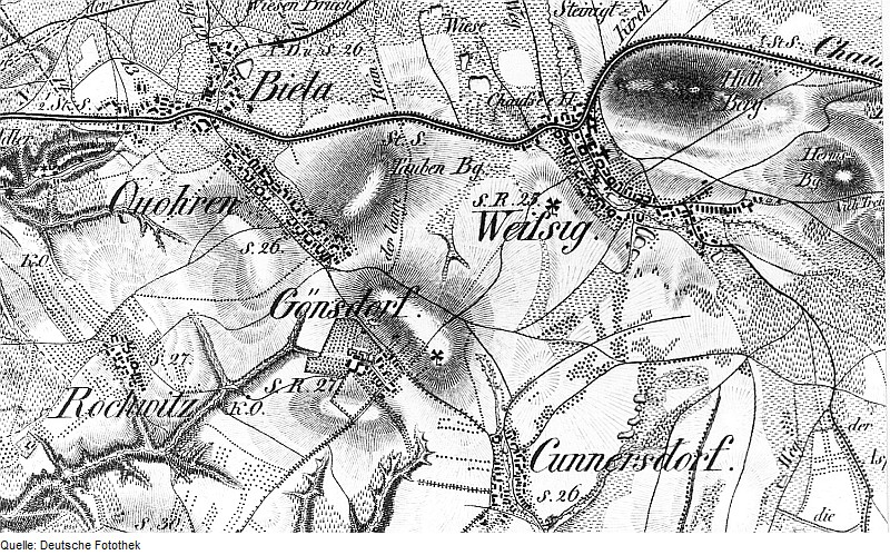 Original image description from the Deutsche Fotothek Dresden-Gönnsdorf. Ausschnitt aus: Oberreit, Sect. Dresden, 1821/22